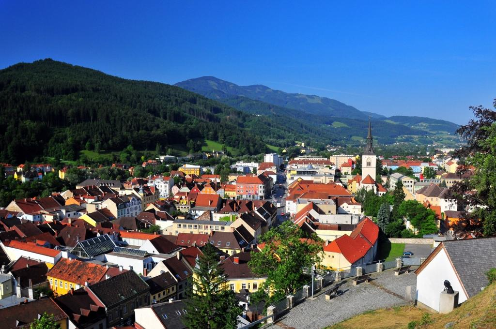 Blick auf die historische Altstadt von Bruck an der Mur - Standort Schlossberg